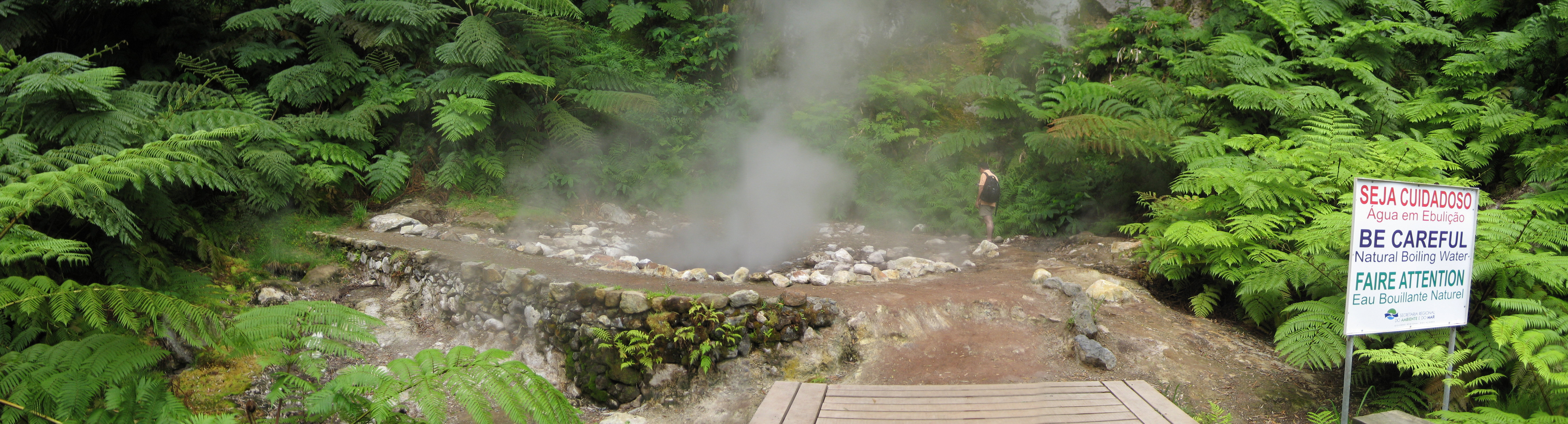 Sao Miguel, Fogo, Hot Spring